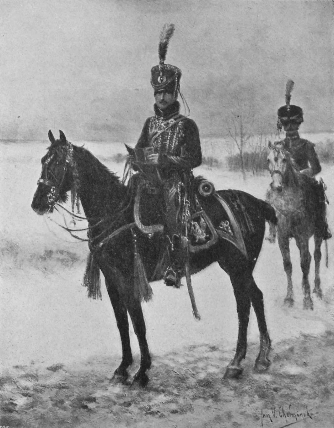 Artur Potocki